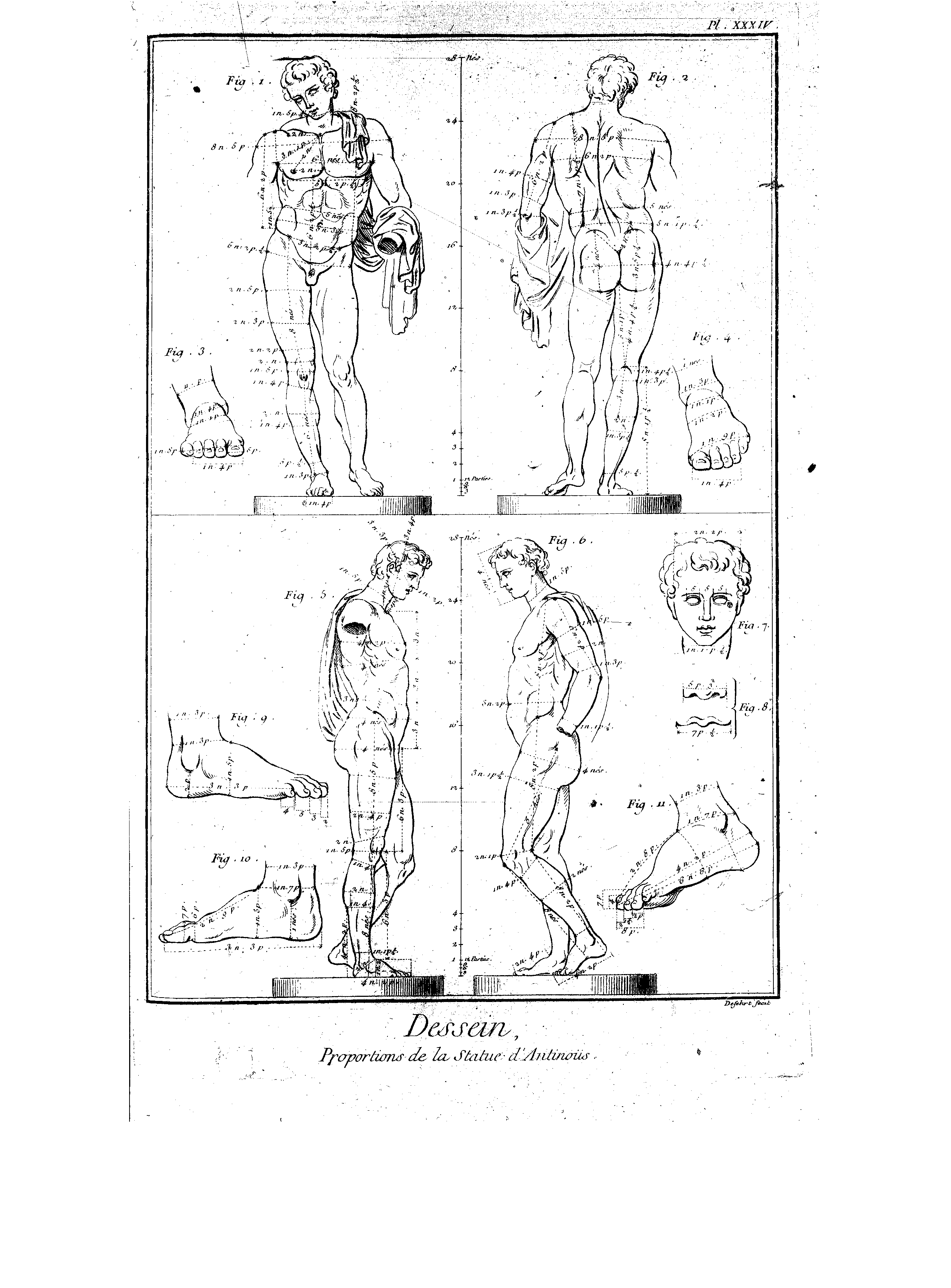 Planches de l'Encyclopédie de Diderot et d'Alembert, volume 2b